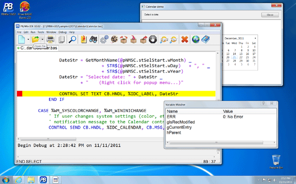 PBIDE10